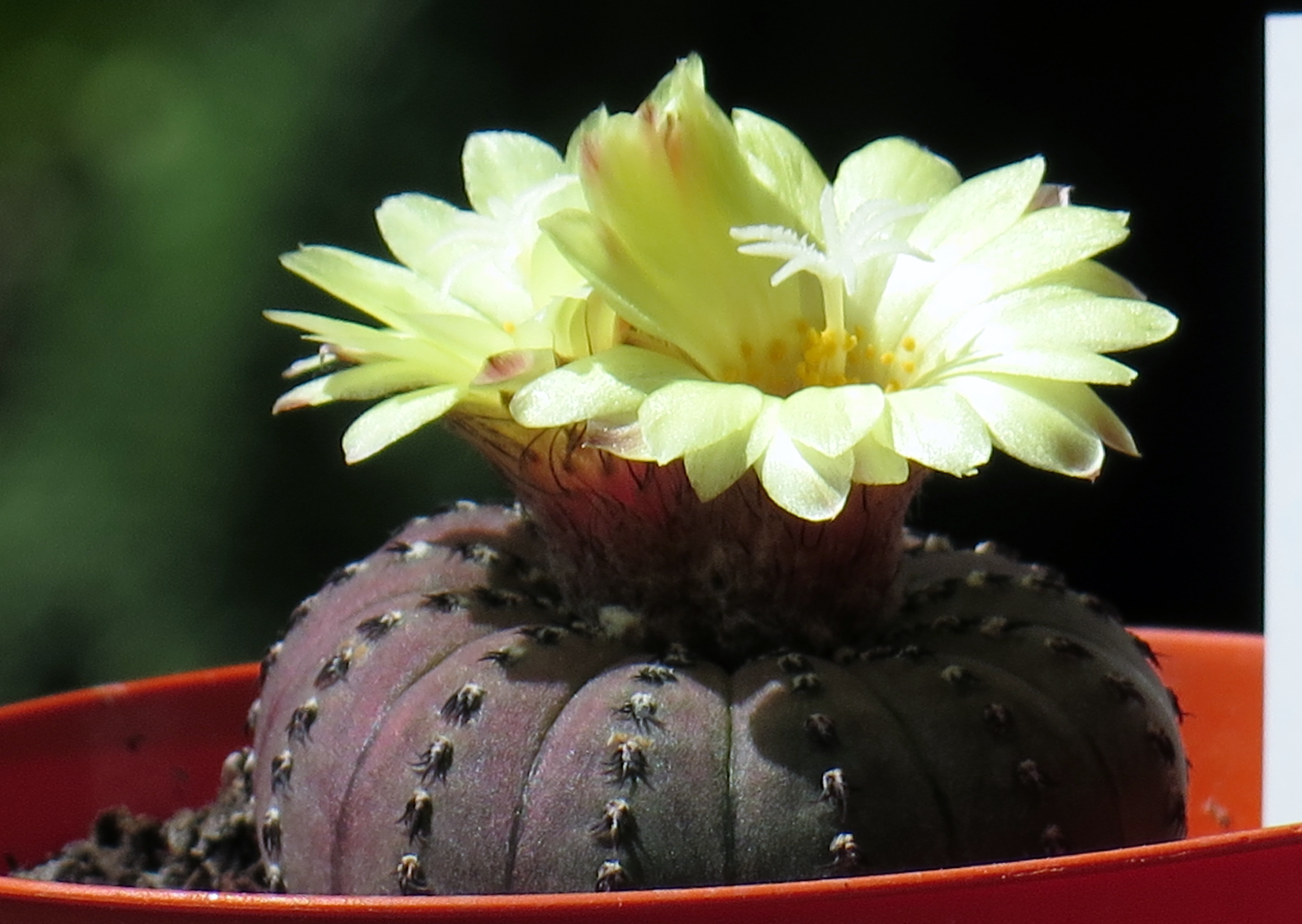 I fiori della frailea castanea